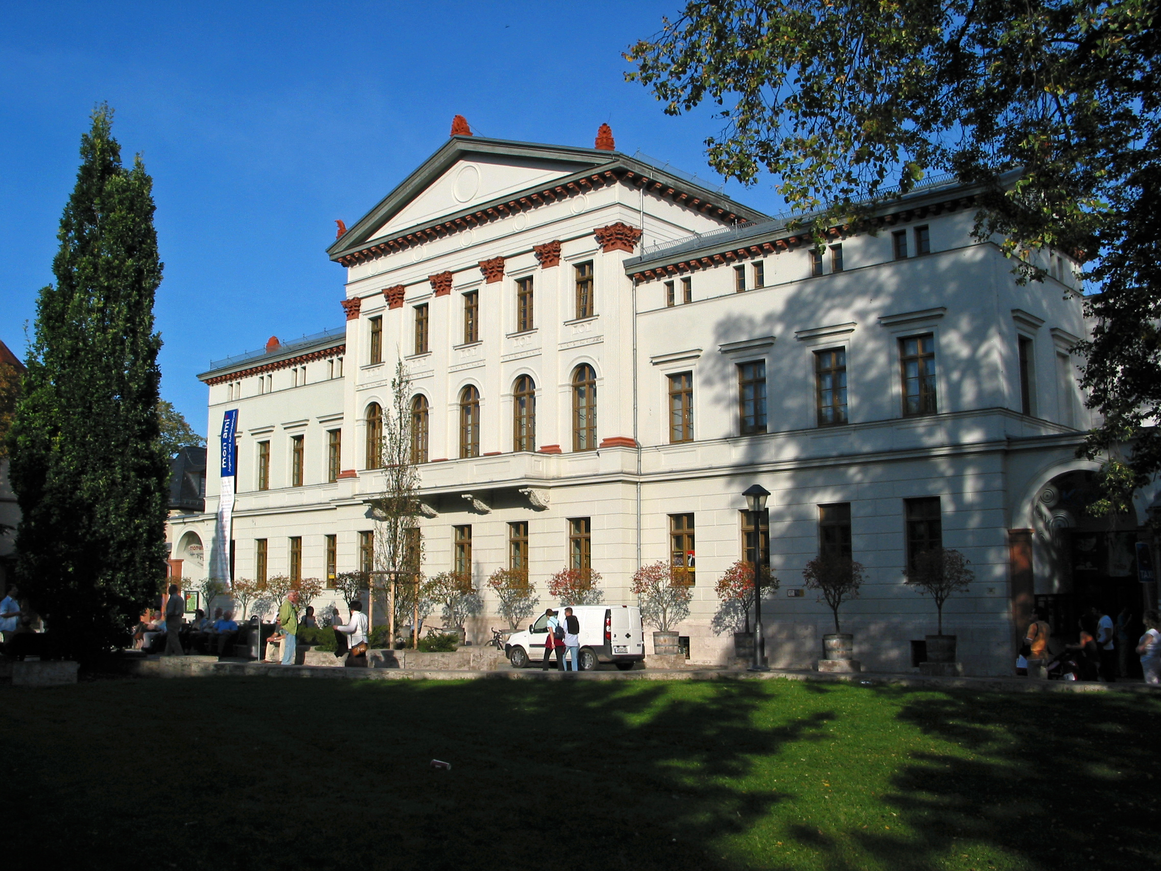 Das im spätklassizistischen Stil 1856-60 nach dem Entwurf von Carl Ferdinand Streichhan errichtete Haus der Erholung. 1864 wurde hier die Shakespeare-Gesellschaft ins Leben gerufen. Nach 1945 wurde es als „Klubhaus der Jugend“ genutzt. Heute befindet sich darin das Jugend- und Kulturzentrum "mon ami" mit eigenem Kino.